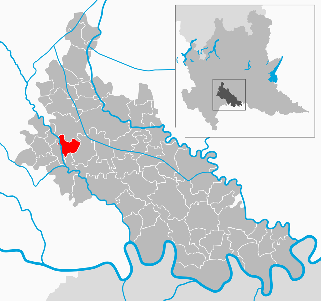 Il comune di Borgo San Giovanni nella provincia di Lodi